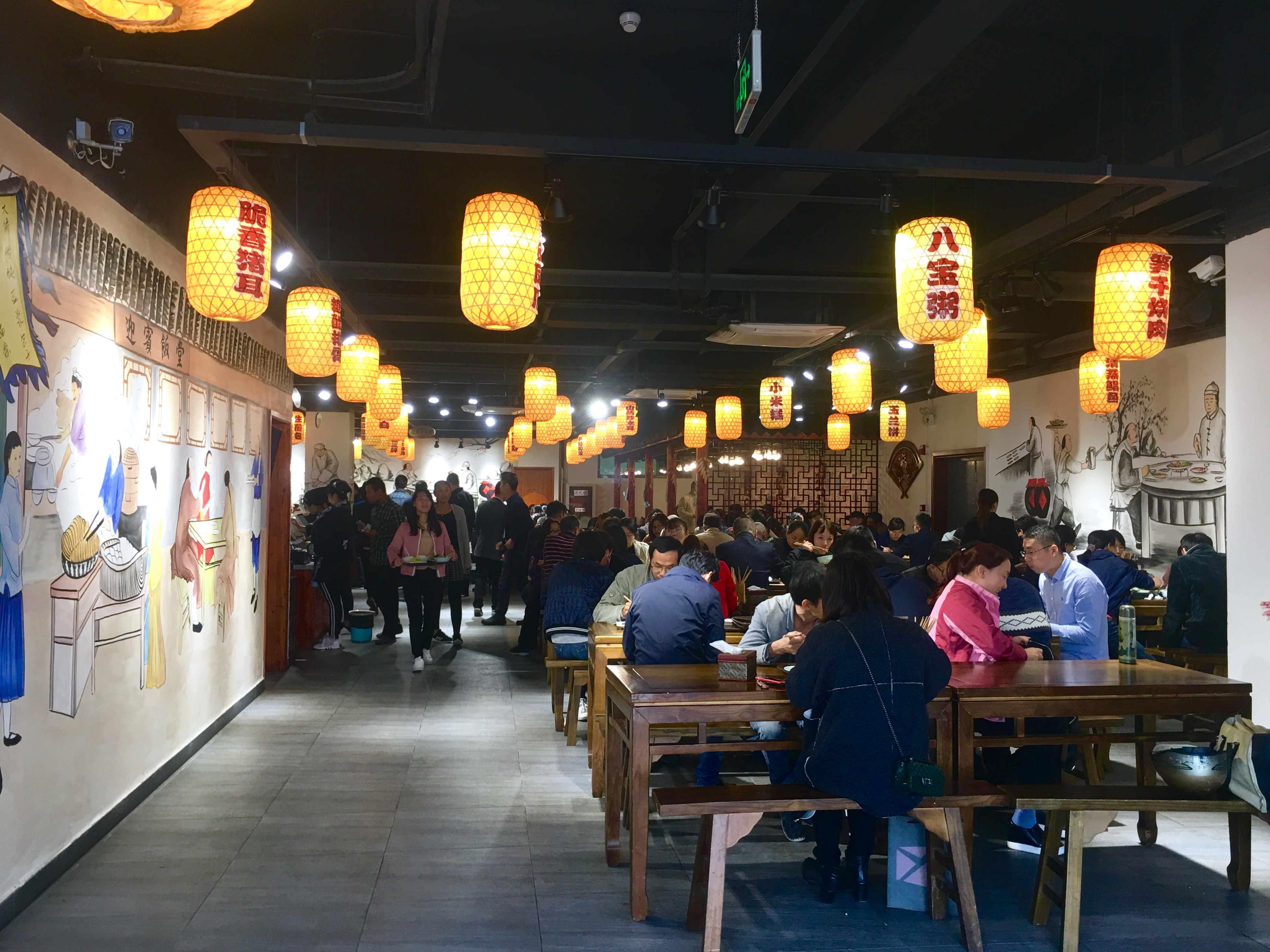 迎賓樓大堂